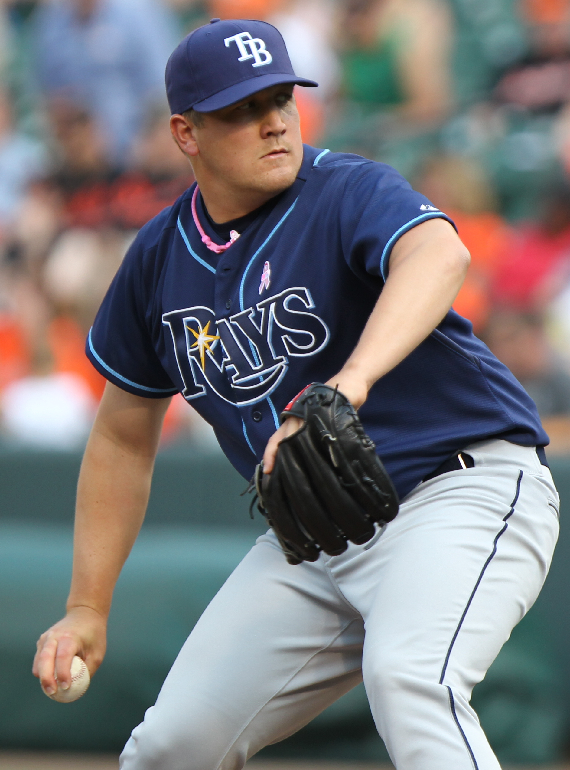 Rob Delaney